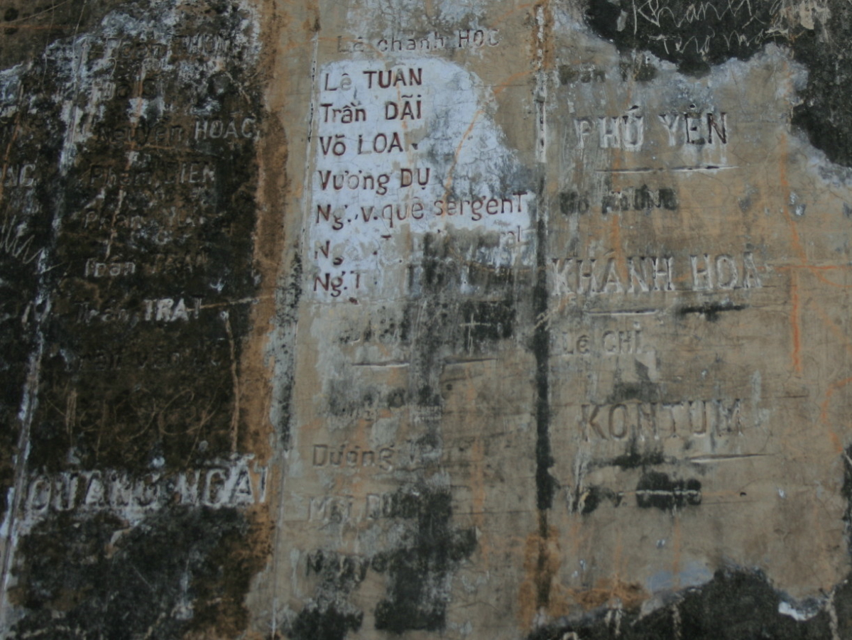 Mặt sau Đài tưởng niệm chiến sĩ Trận Vong (Huế). Chỉ một số tên của nhân vật hiện còn đọc được.